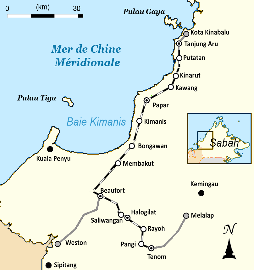 Chemin de fer d’État de Sabah, Malaisie orientale, Ile de Bornéo